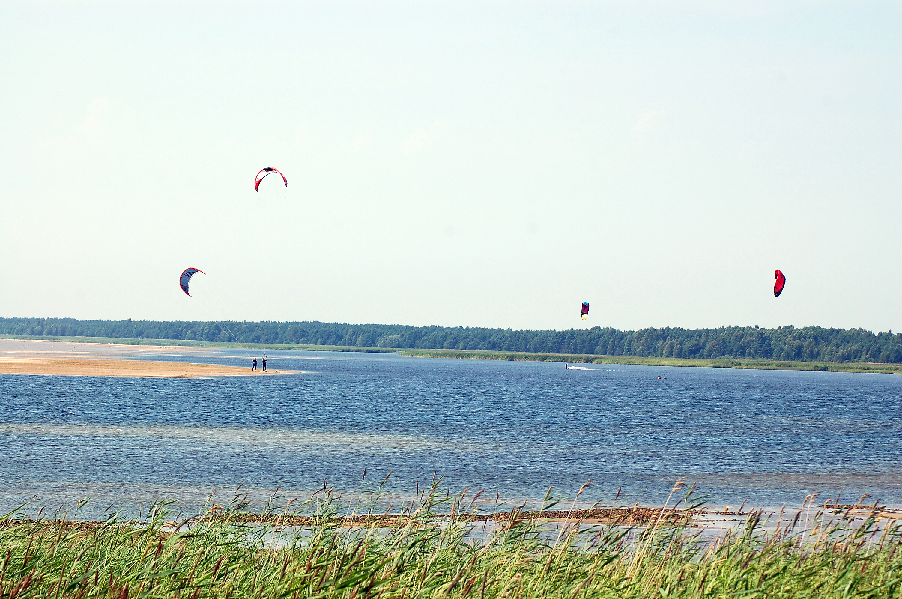 Asukoht: Nasva, Saaremaa